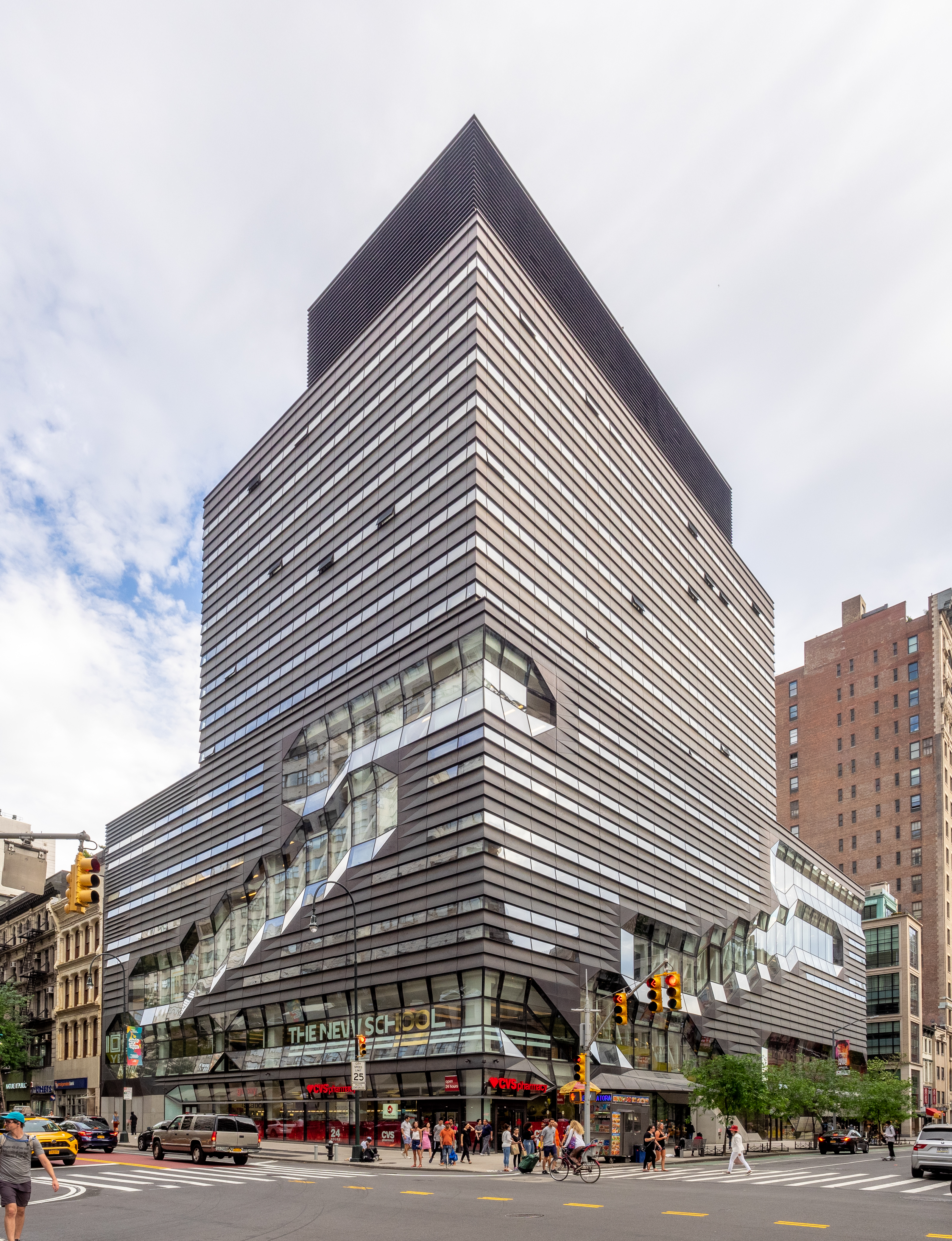 Greenwich Village, NYC